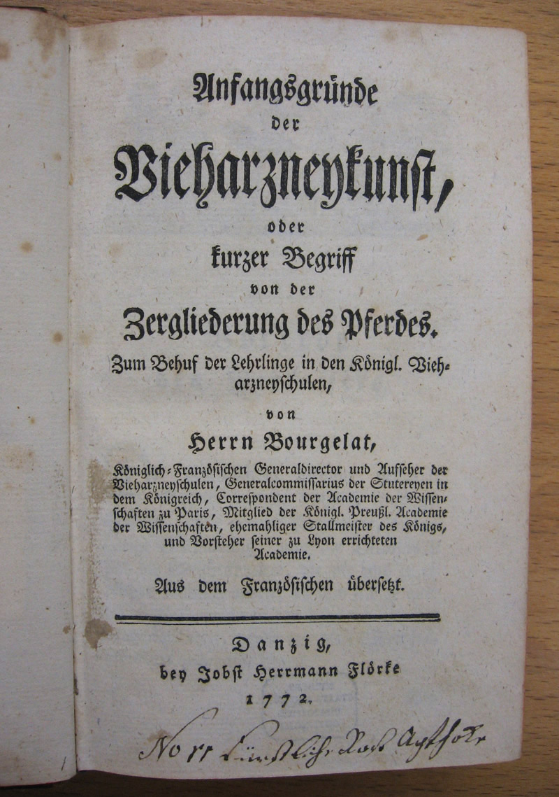 Titelseite von Claude Bourgelat (1712–1779), Anfangsgründe der Vieharzneykunst (Originaltitel: Précis anatomique du Corps du cheval), Danzig 1772